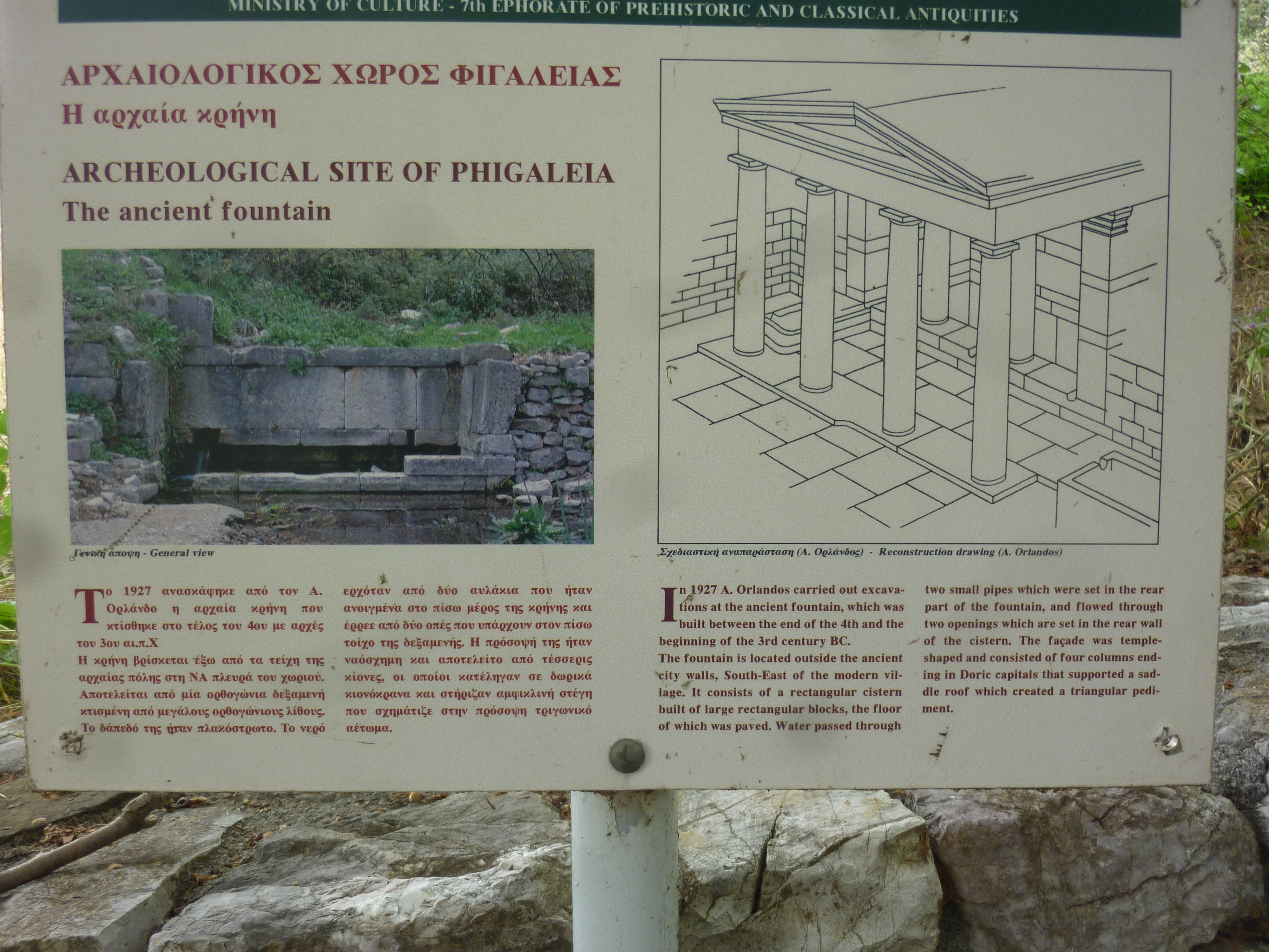 Notice de la fontaine de Phigaleia (Grèce)